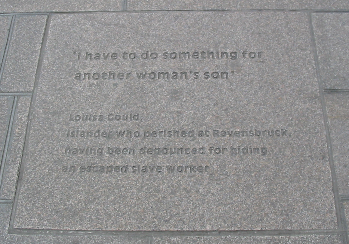 Nrf: Pliaque dans l'pavé à Saint Hélyi, Jèrri, en mémouaithe d'l'Otchupâtion.